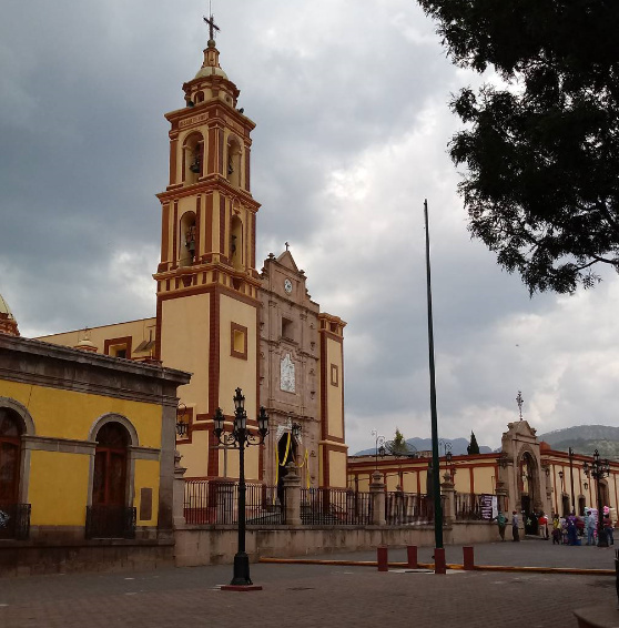 Parroquia de Tlaxco, Tlaxcala